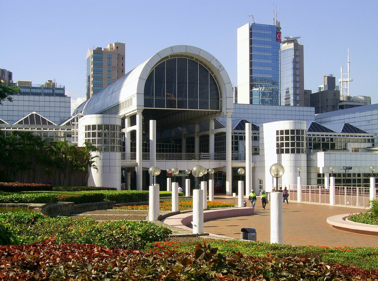 中文（香港）: 九龍公園擴展重建部分